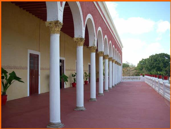 una de los corredores hacienda San José Chactún